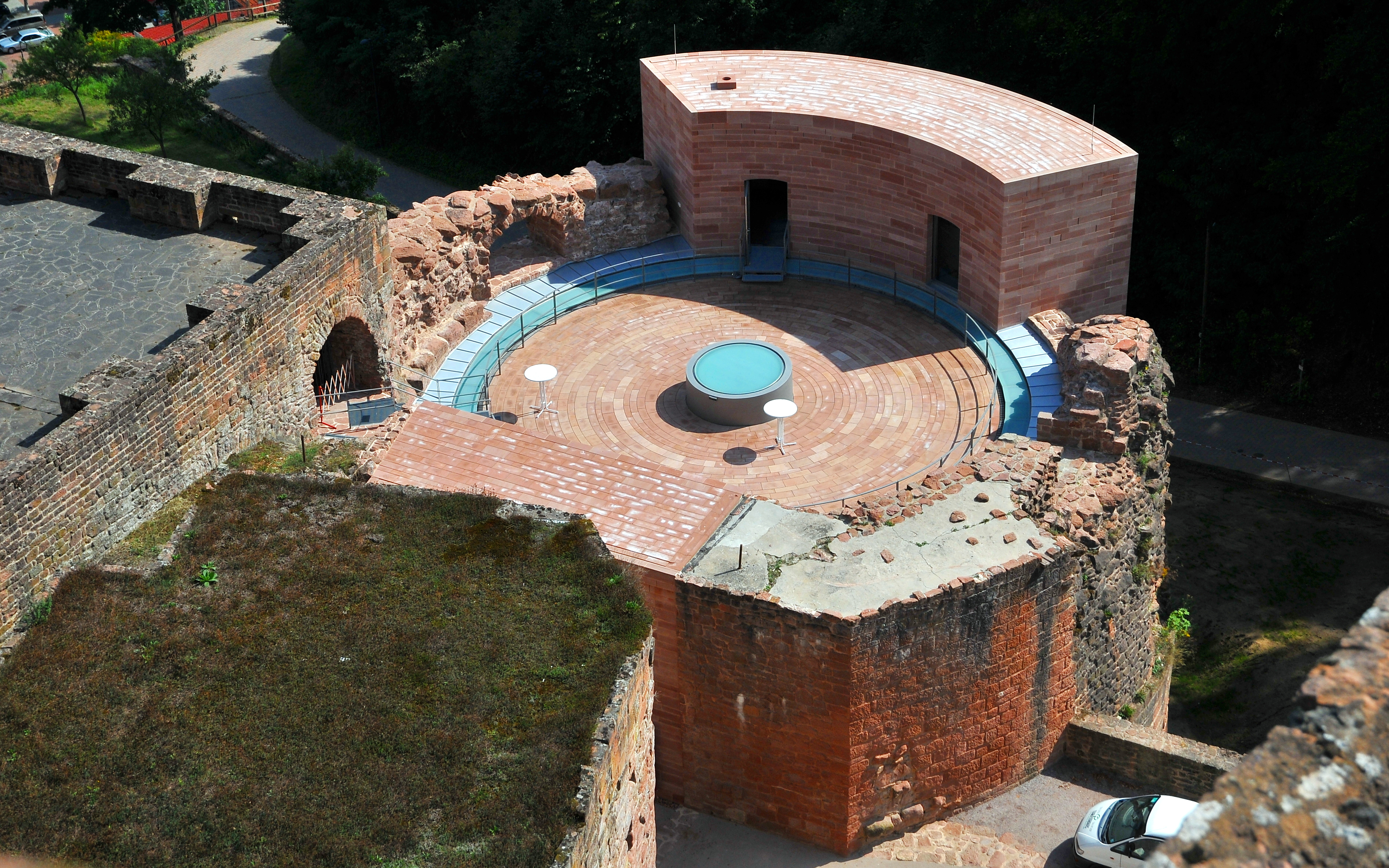 Erneuertes Rondell auf der Hardenburg.